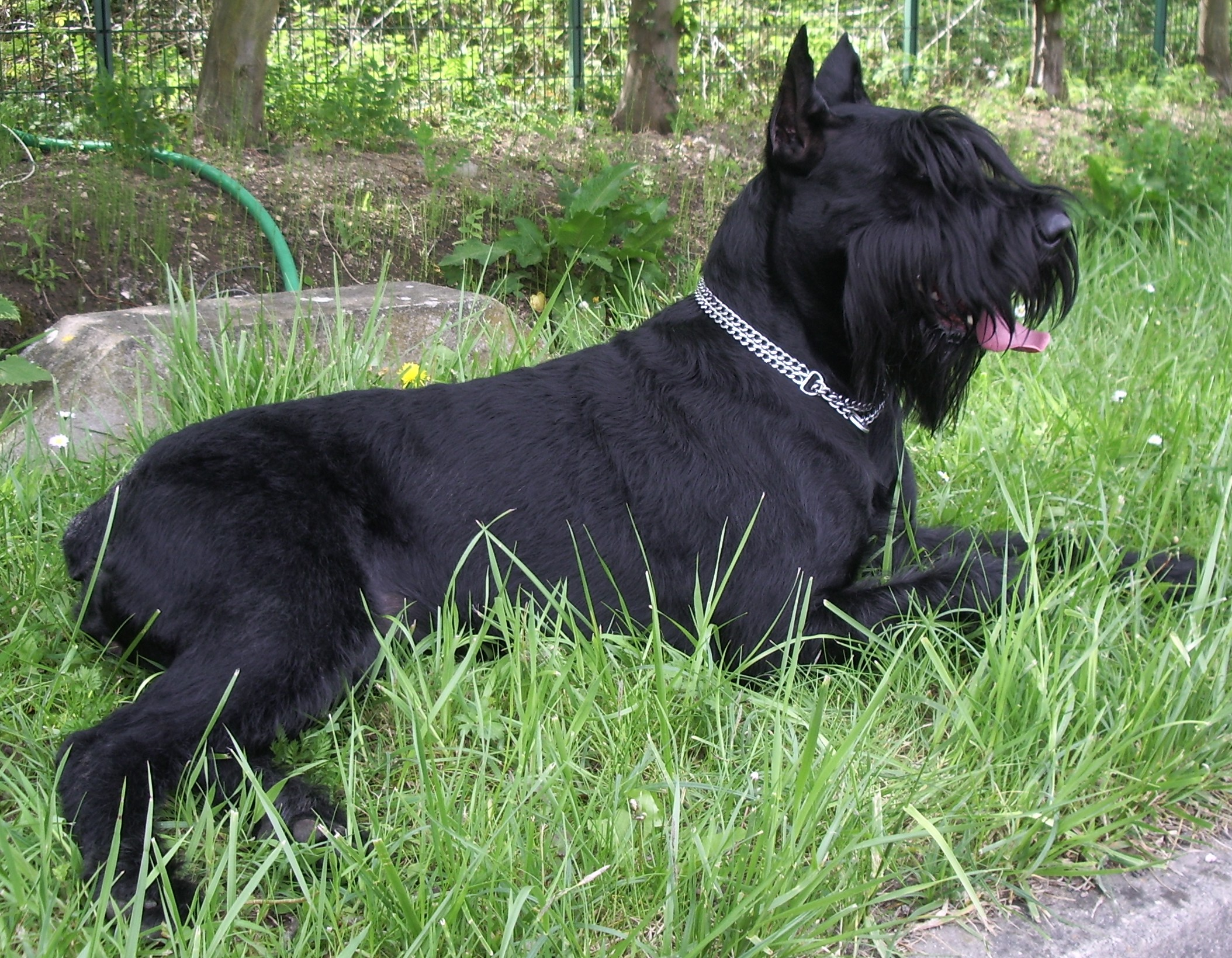 Photo d'une femelle Schnauzer Géante Noire Photo personnelle, collection Hervé Herbillon